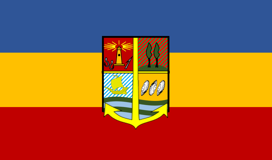 Bandera de la comuna de Guaitecas (Chile)